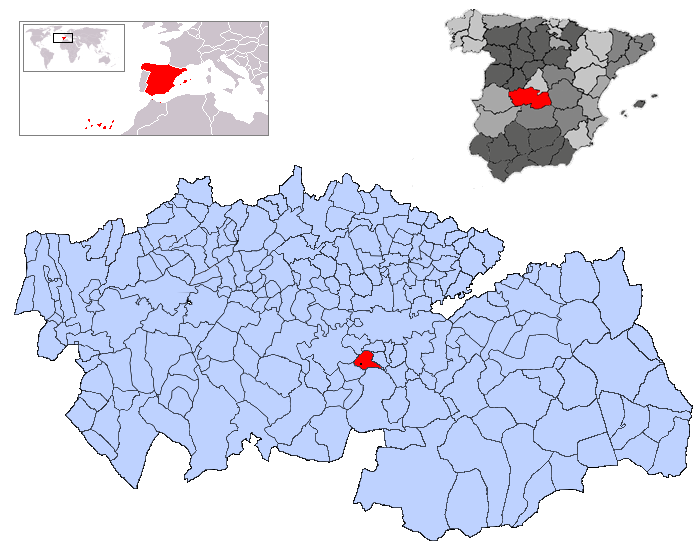 Casasbuenas en la provincia de Toledo